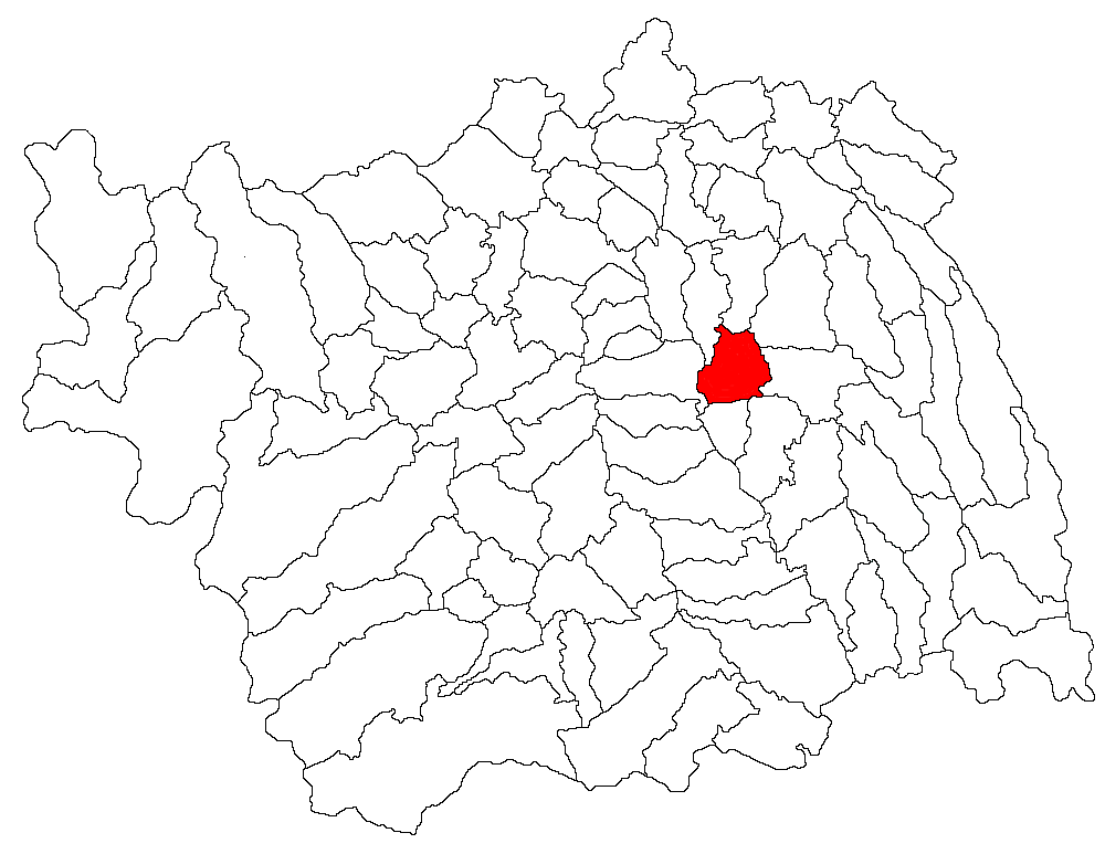 Categorie:Hărţi ale judeţului Bacău